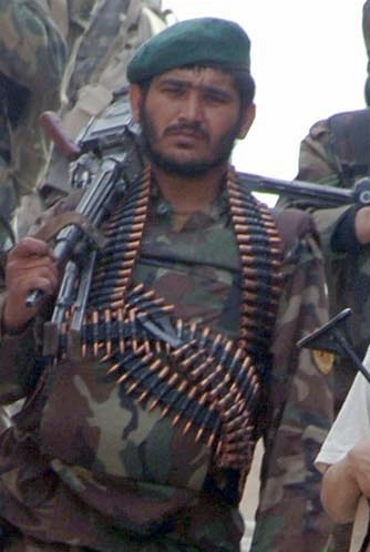 ANA soldier